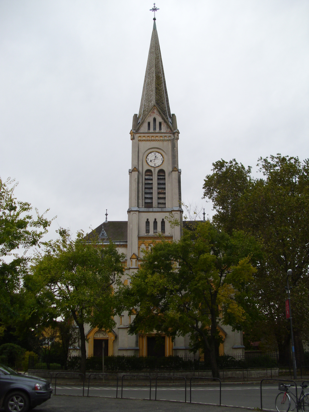 Ev. templom (Szombathely, Körmendi út 2 .)